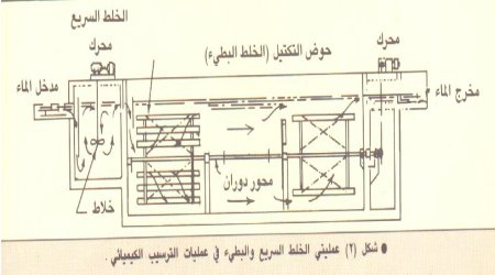 عمليتي الخلط السريع و البطيئ في عمليات الترسيب الكيميائي